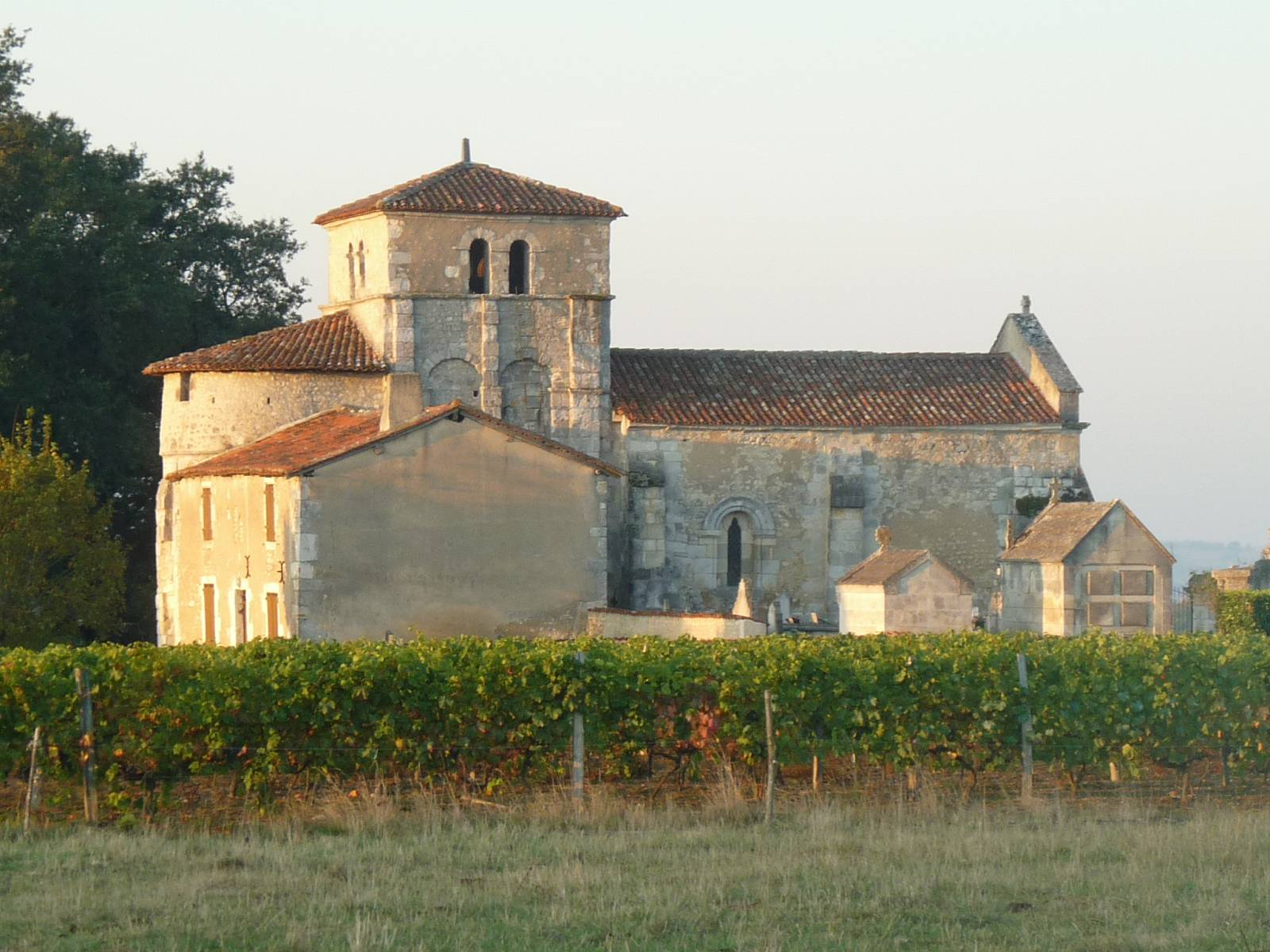 église de Porcheresse, Blanzac (16), France